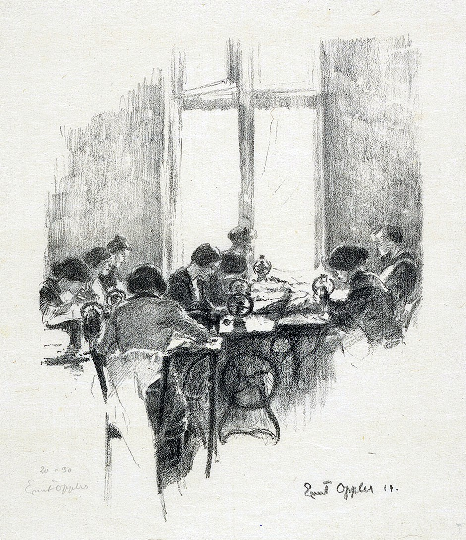 Kriegsnähstube Lithographie 27 x 21,3 cm (Darstellung); 1914.